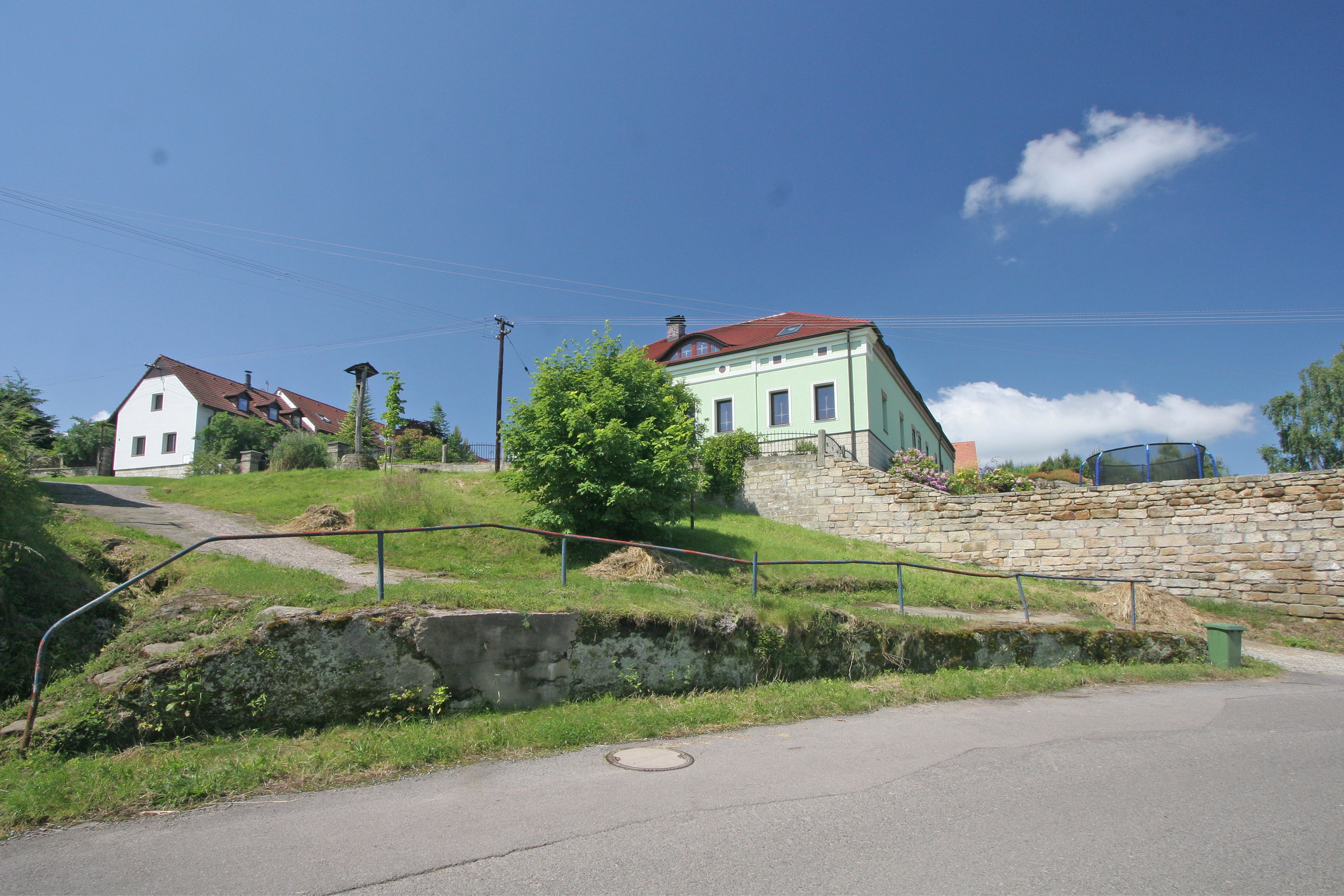 Škrovád čp. 3